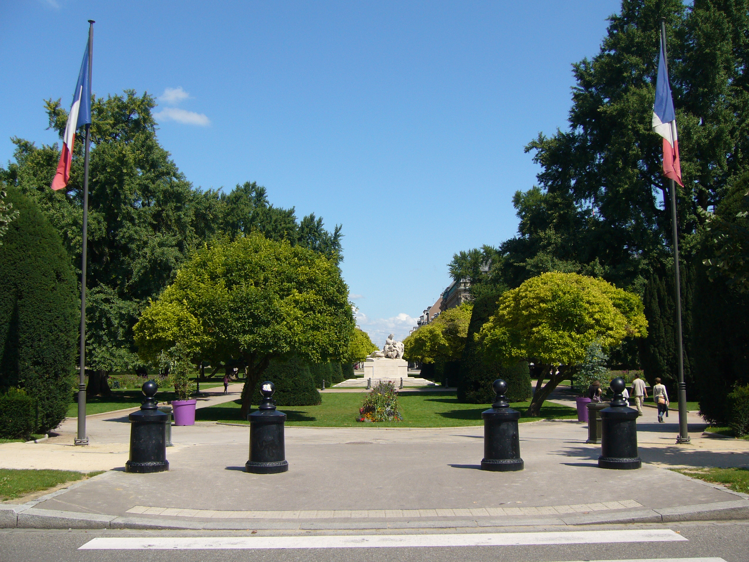 La place de la République, Strasbourg